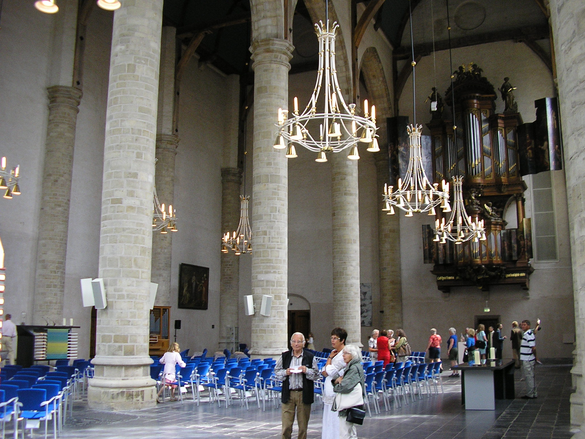 Zicht op een deel van het interieur van de Nieuwe Kerk in Middelburg